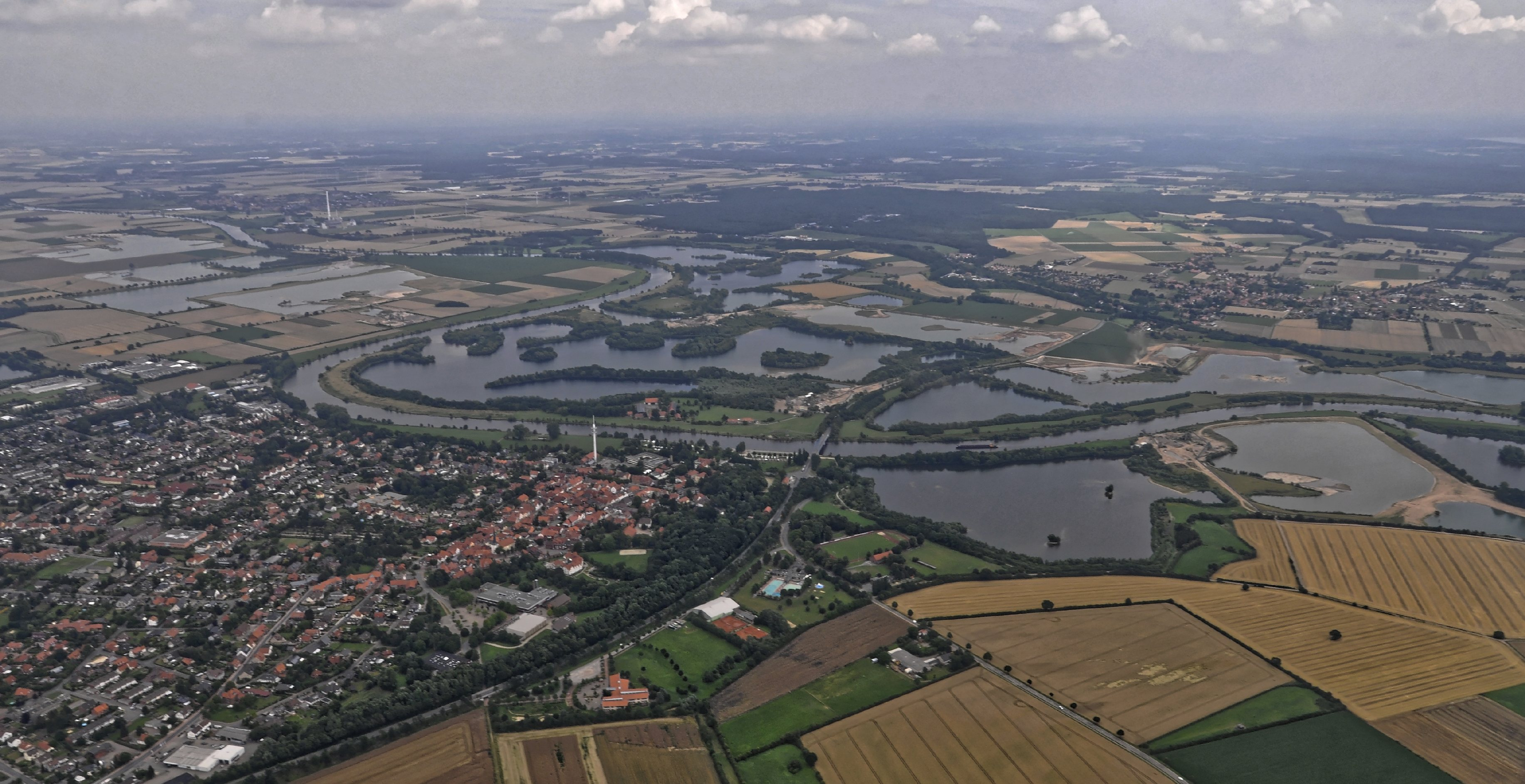 Bilder vom Flug Nordholz-Hammelburg 2015: Blick von Westen auf Stolzenau und, jenseits der Weser, das Naturschutzgebiet Domäne Stolzenau/Leese in der Gemarkung der niedersächsischen Gemeinde Leese. Leese am rechten Bildrand.